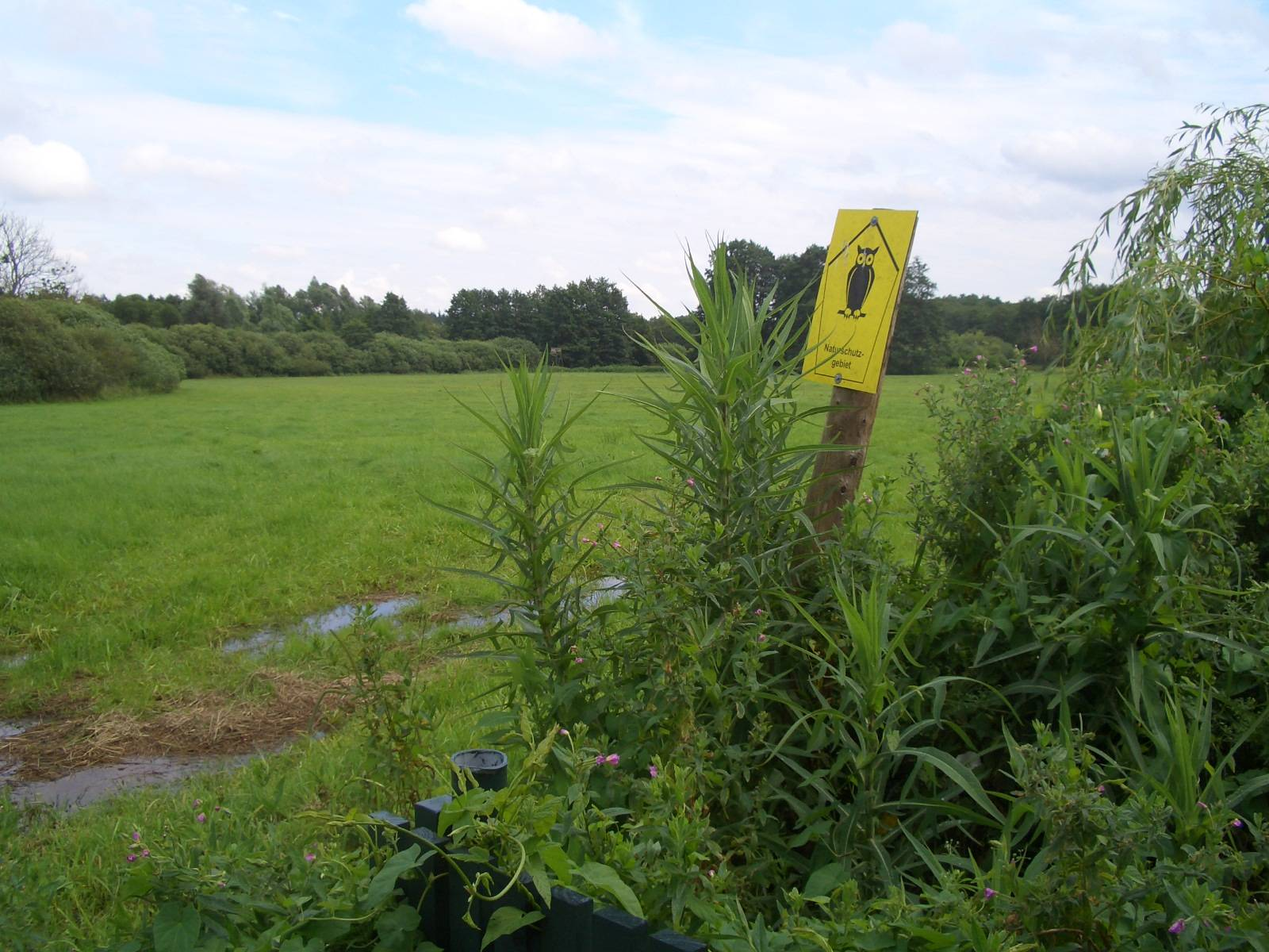 Blick in eine gemähte Uferflächen der Warnow (Bestandteil des Naturschutzgebiet Unteres Warnowland).